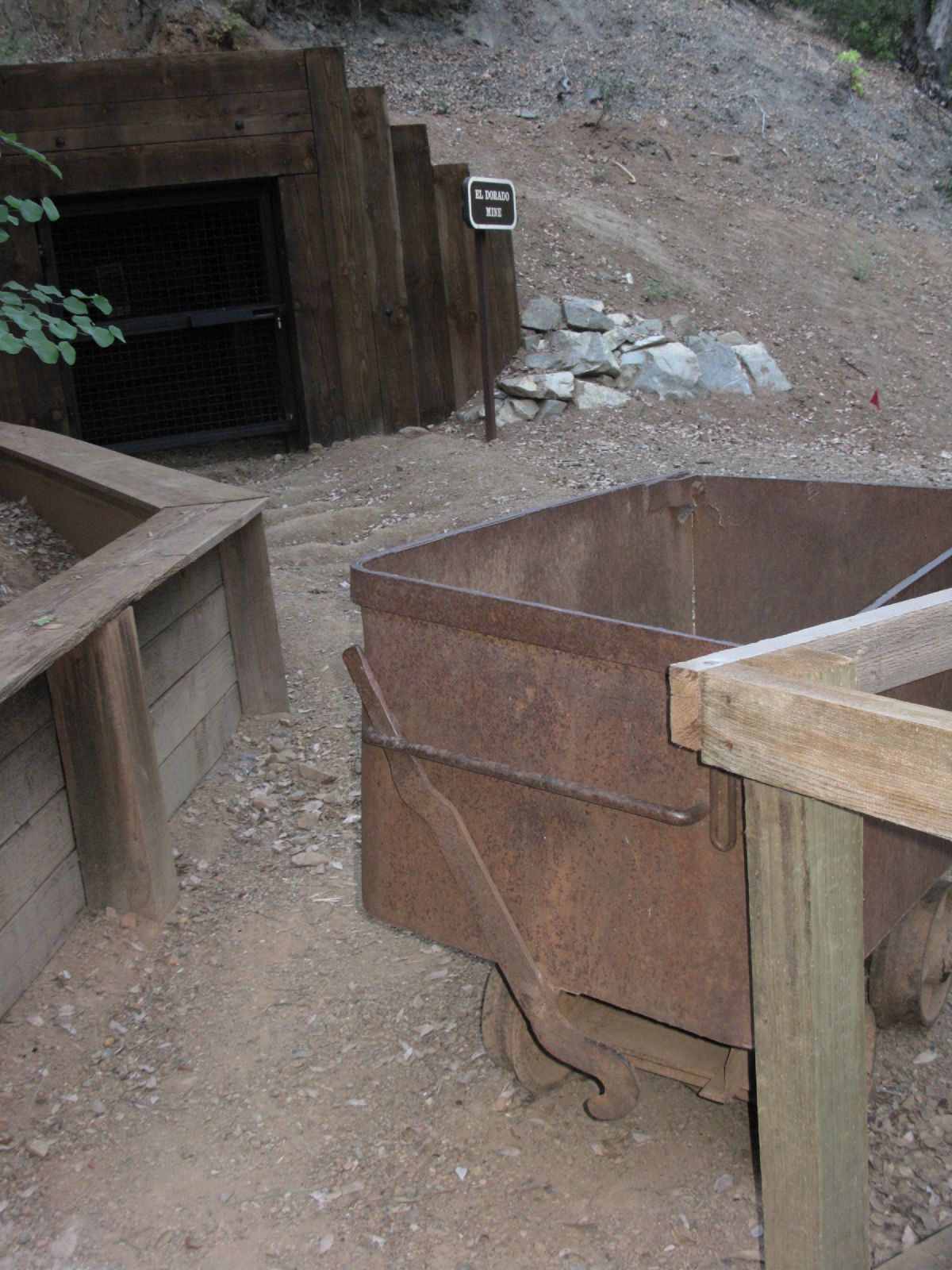 El Dorado Gold Mine